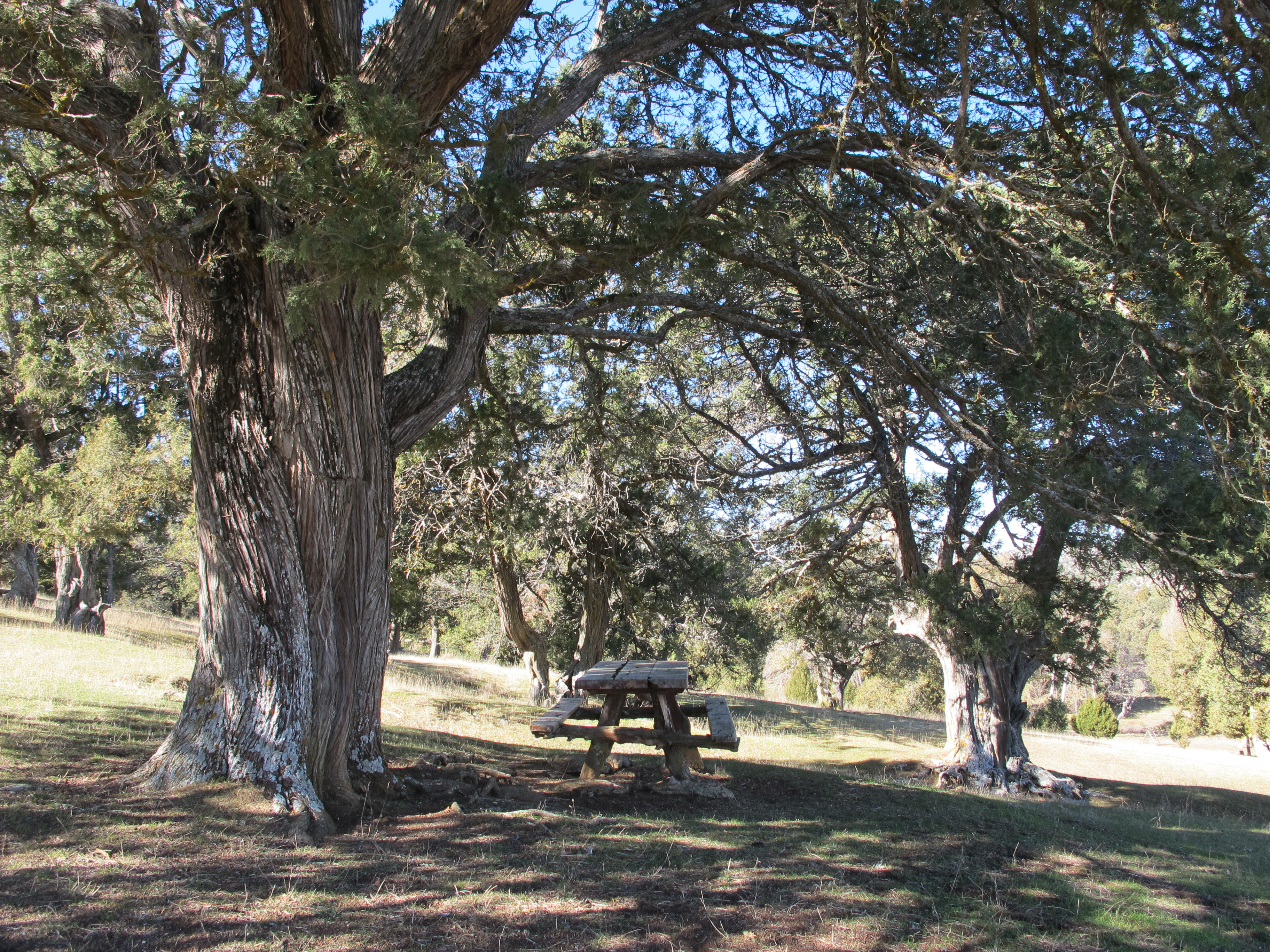 Foto de un ejemplar de las enebras del sabinar de Hornuez